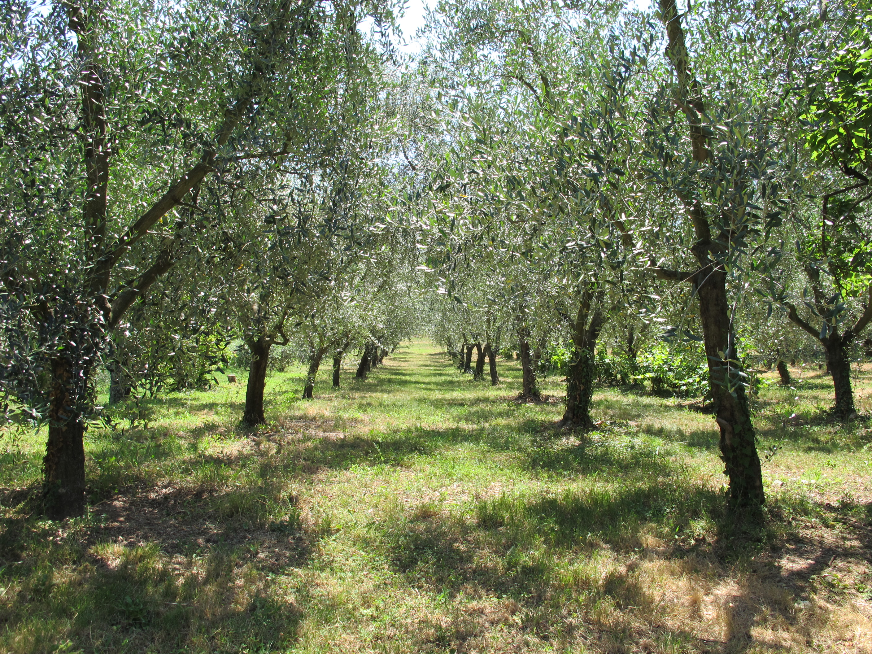 Villa romana 05 oliveto